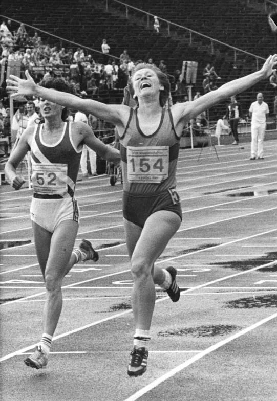 Christine Wachtel, Hildegard Körner-Ullrich ADN-ZB Gahlbeck 10.8.85 Leipzig: 36. DDR-Leichtathletik-Meisterschaften- Den Titel im 800 m Lauf errang die 20jährige Christine Wachtel (SC Neubrandenburg) in 1:58,15 Minuten vor der Vorjahressiegerin Hildegard Körner-Ullrich (l.) vom SC Turbine Erfurt.